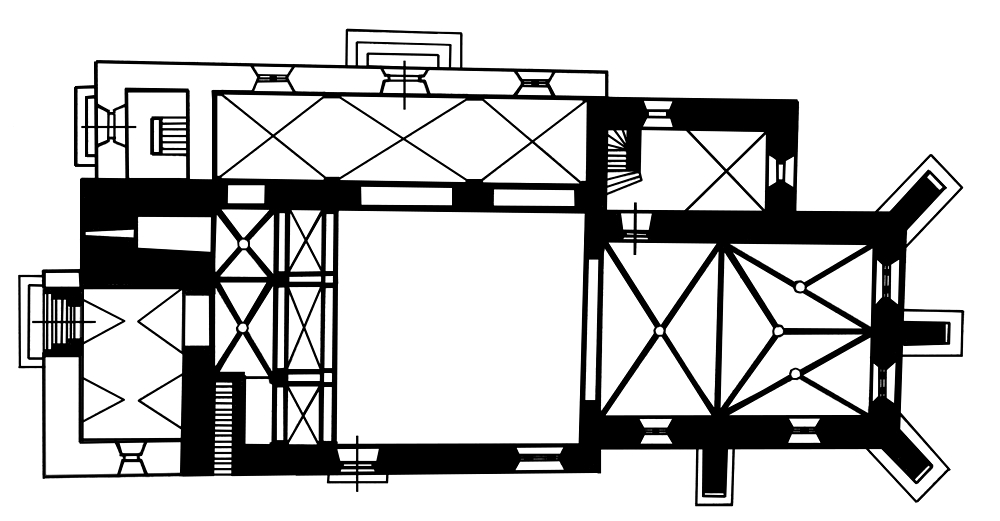 Kostel sv.Martina - půdorys, vlastní dílo